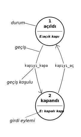 dosyasının svg kaynağı üzerinde gerekli düzeltmeler ve Türkçeleştirme işlemini yaparak oluşturduğum halidir.